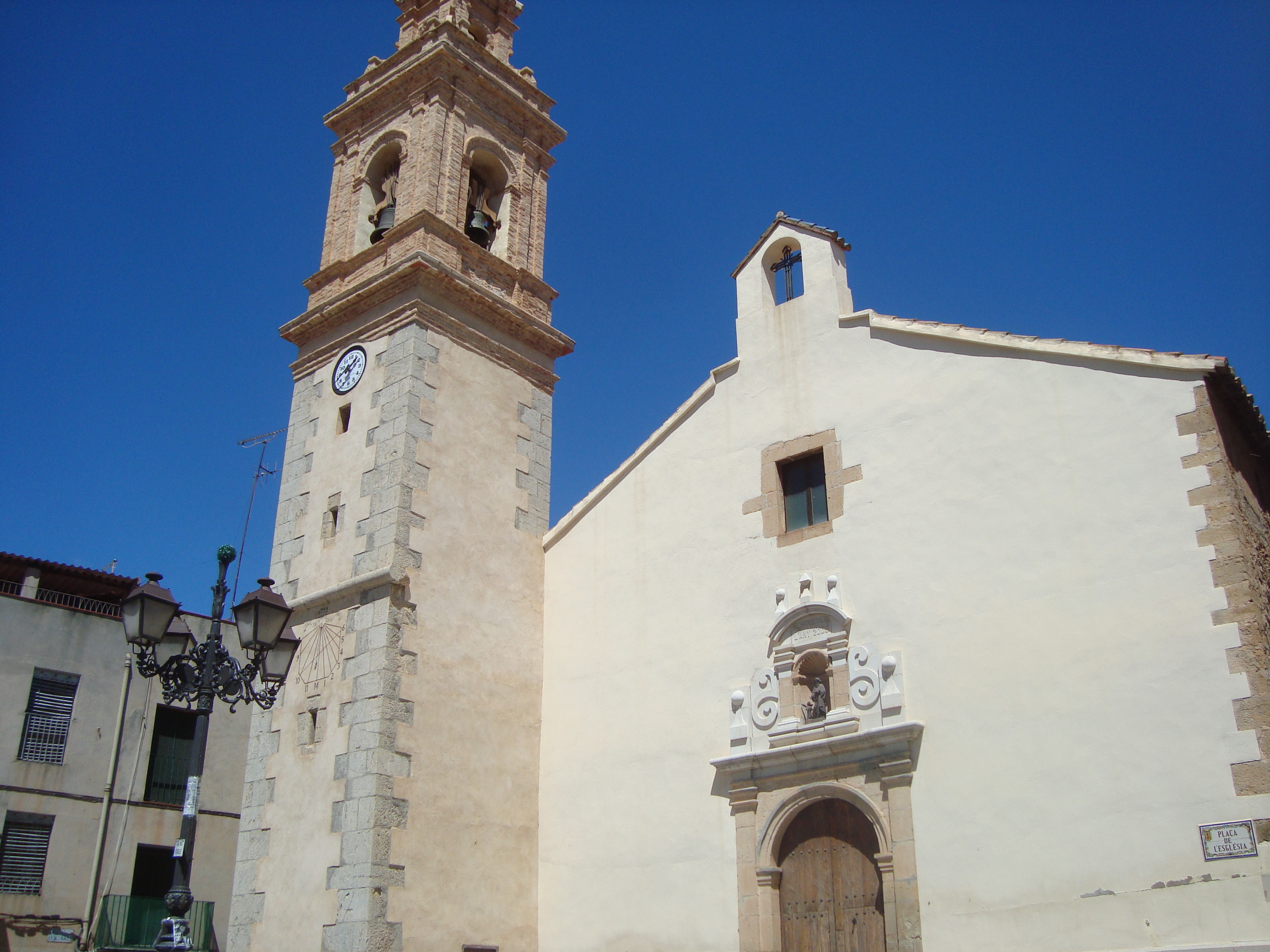 Església parroquial de Sant Mateu (Figueroles) 04.060-001.